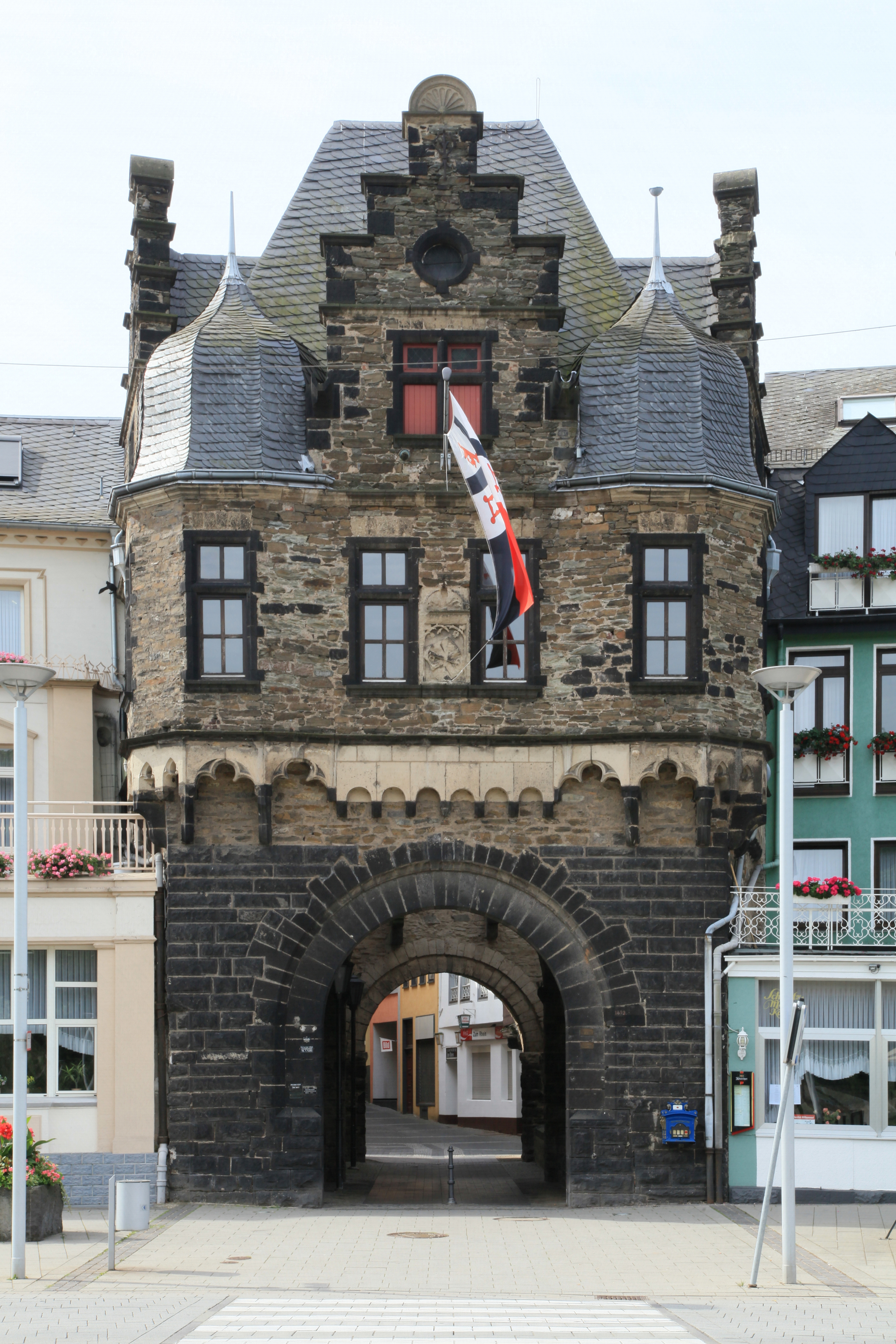 Rheintor, Rheinstraße/Konrad-Adenauer-Allee in Andernach